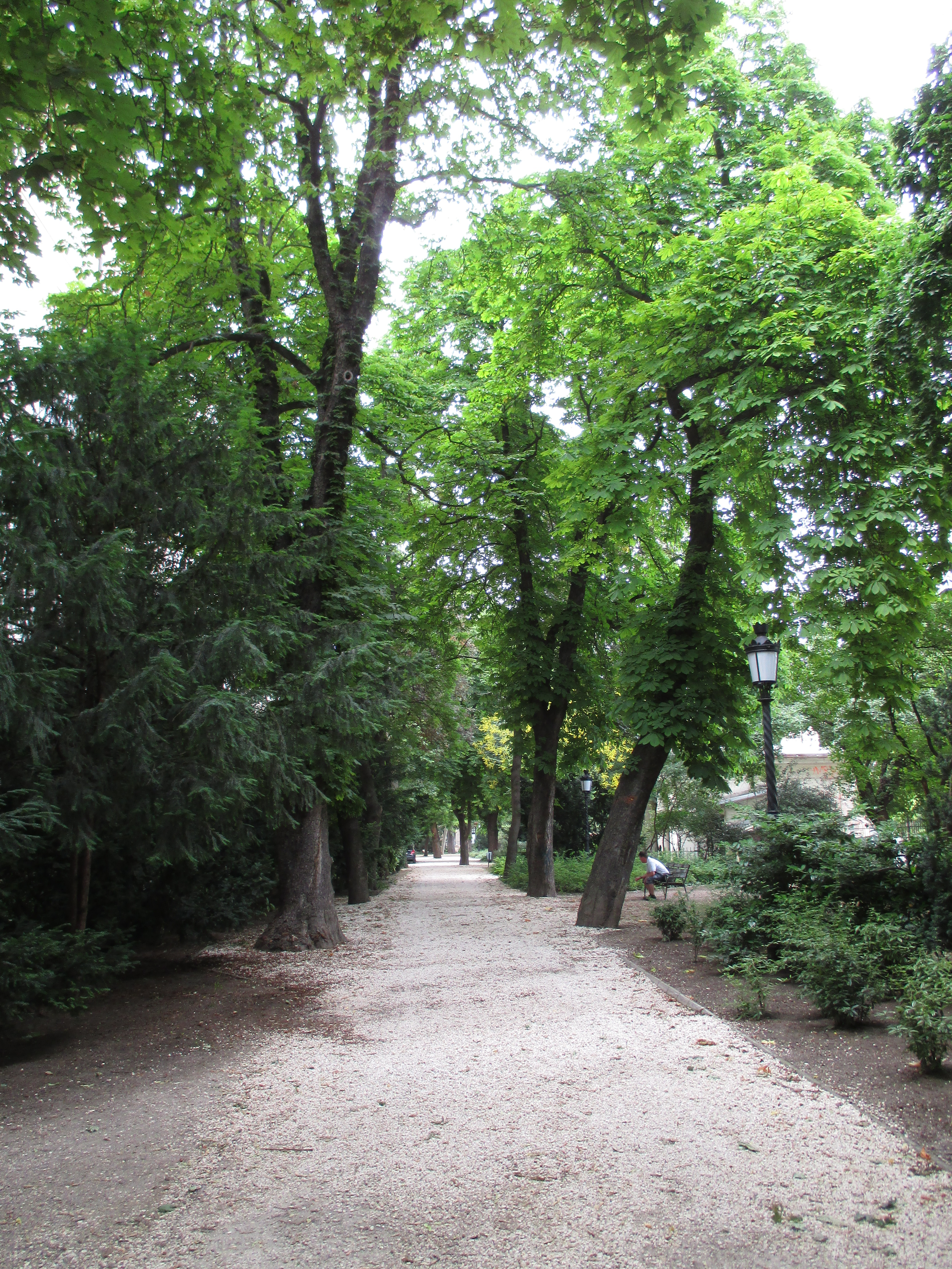 A Múzeumkert egyik sétánya, Budapest